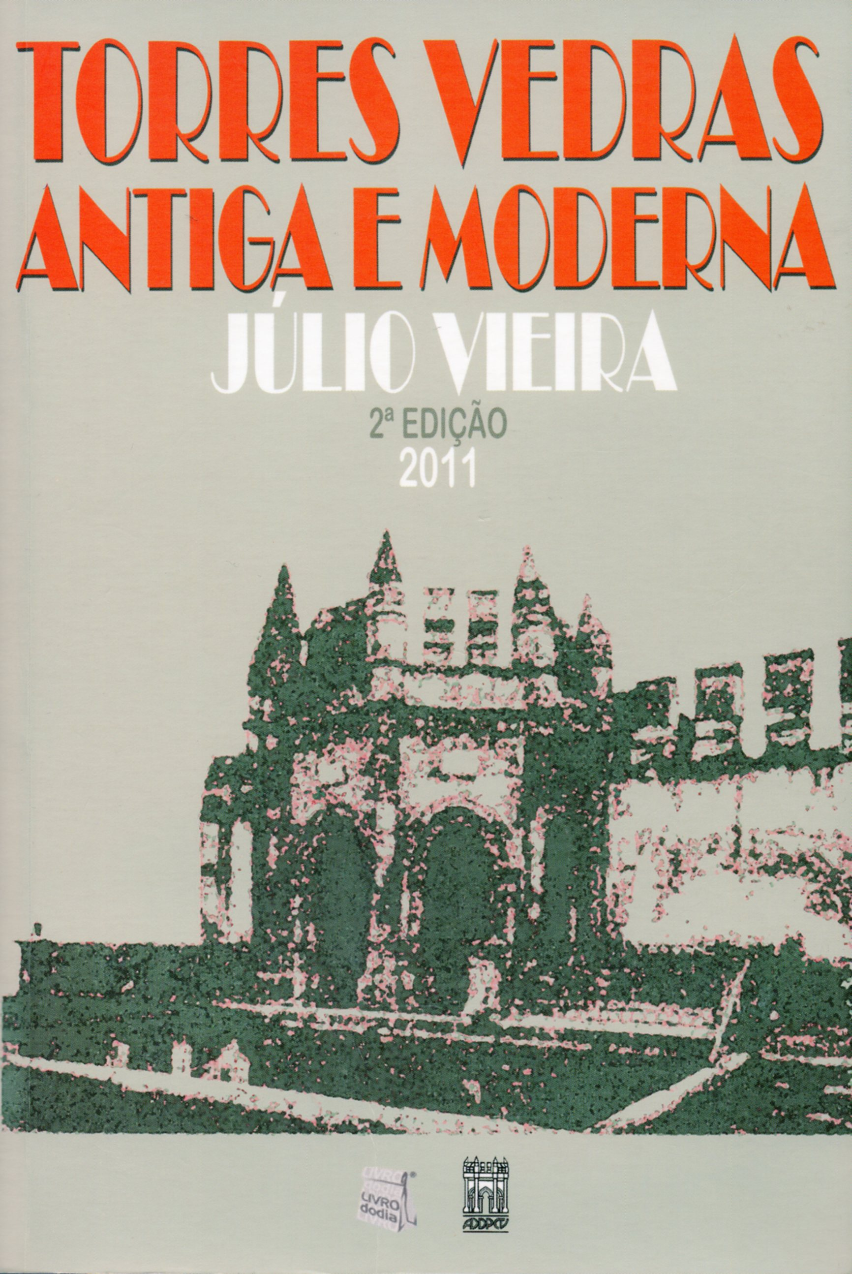 Capa da 2ª edição do livro Torres Vedras antiga e moderna de Júlio Vieira do Nascimento em 2011